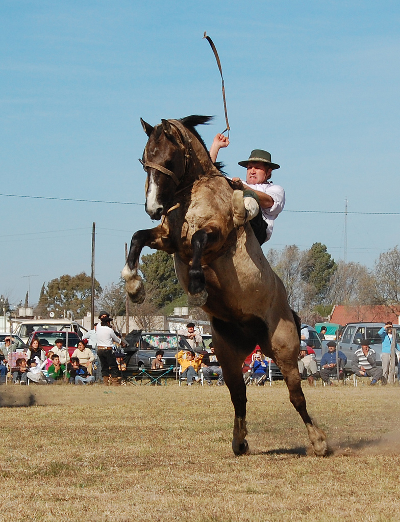 jinete jineteada doma